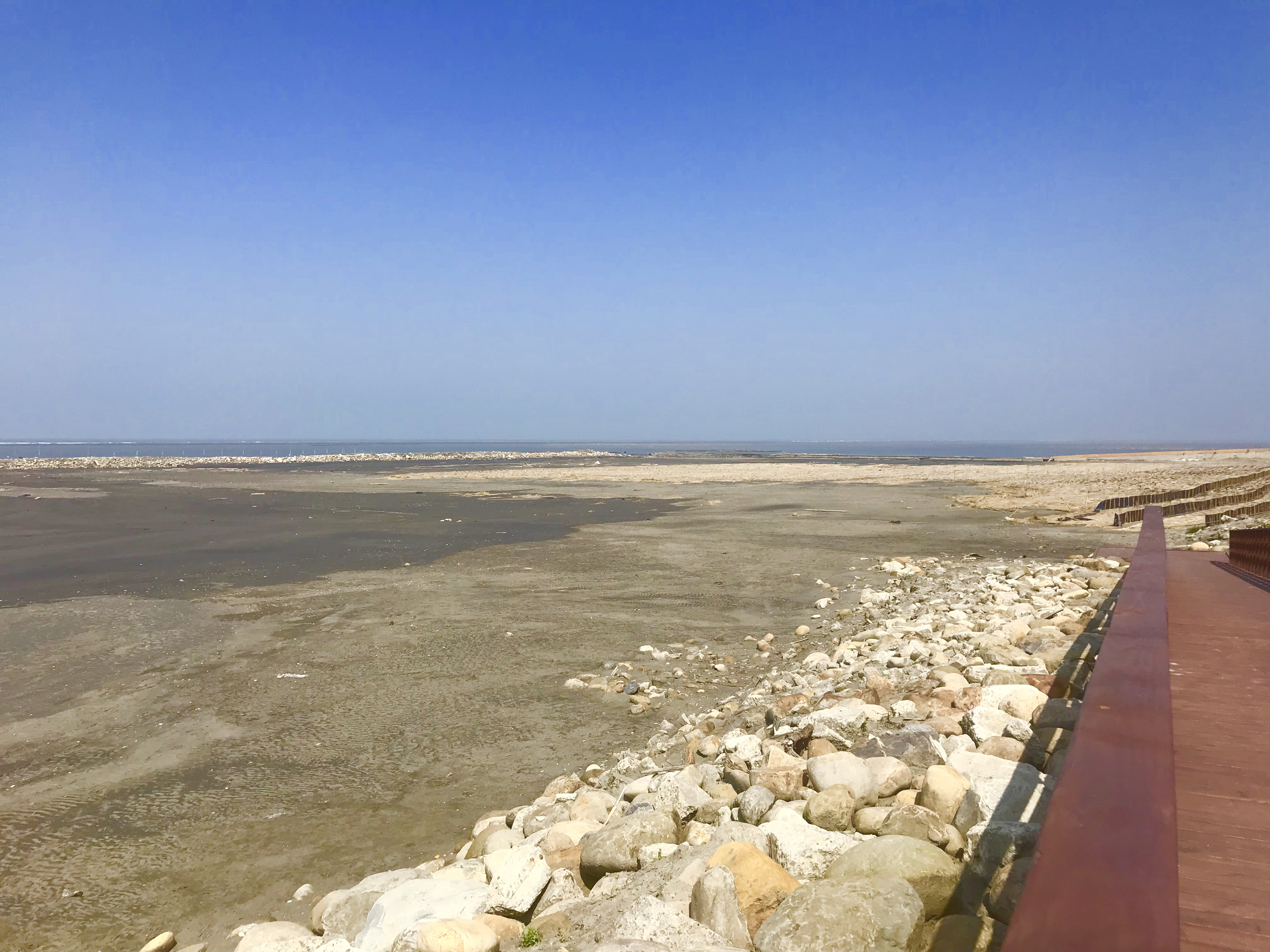 三條崙海水浴場沙灘